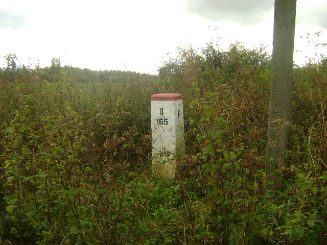 Znak graniczny w pobliżu szczytu Wzniesienia, w południowo-zachodniej Polsce, w południowo-wschodniej części Przedgórza Sudeckiego na Przedgórzu Paczkowskim.